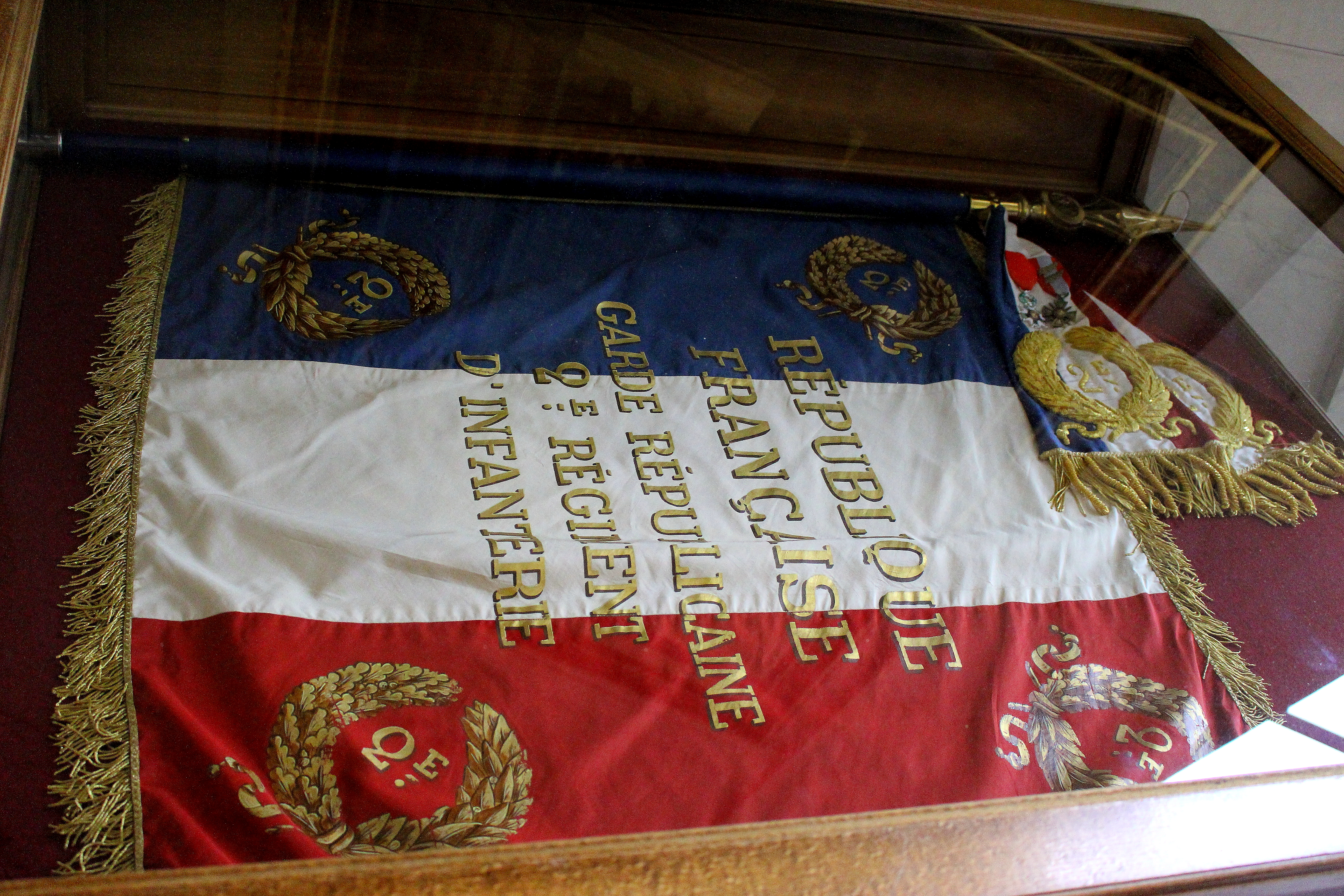 Drapeau français appartenant au 2ème Régiment d'infanterie de la Garde Républicaine. Exposé en septembre 2017, au Palais de l'Élysée.